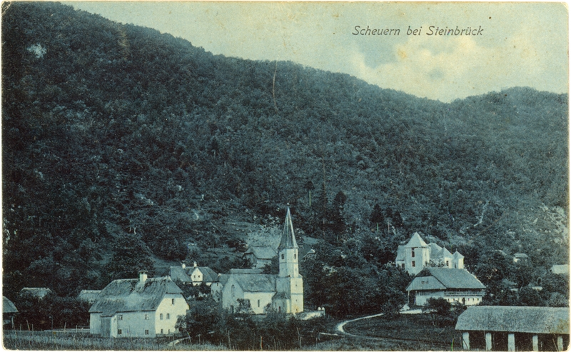 Širje, naselje v občini Laško, razglednica iz leta 1914, avtor neznan.